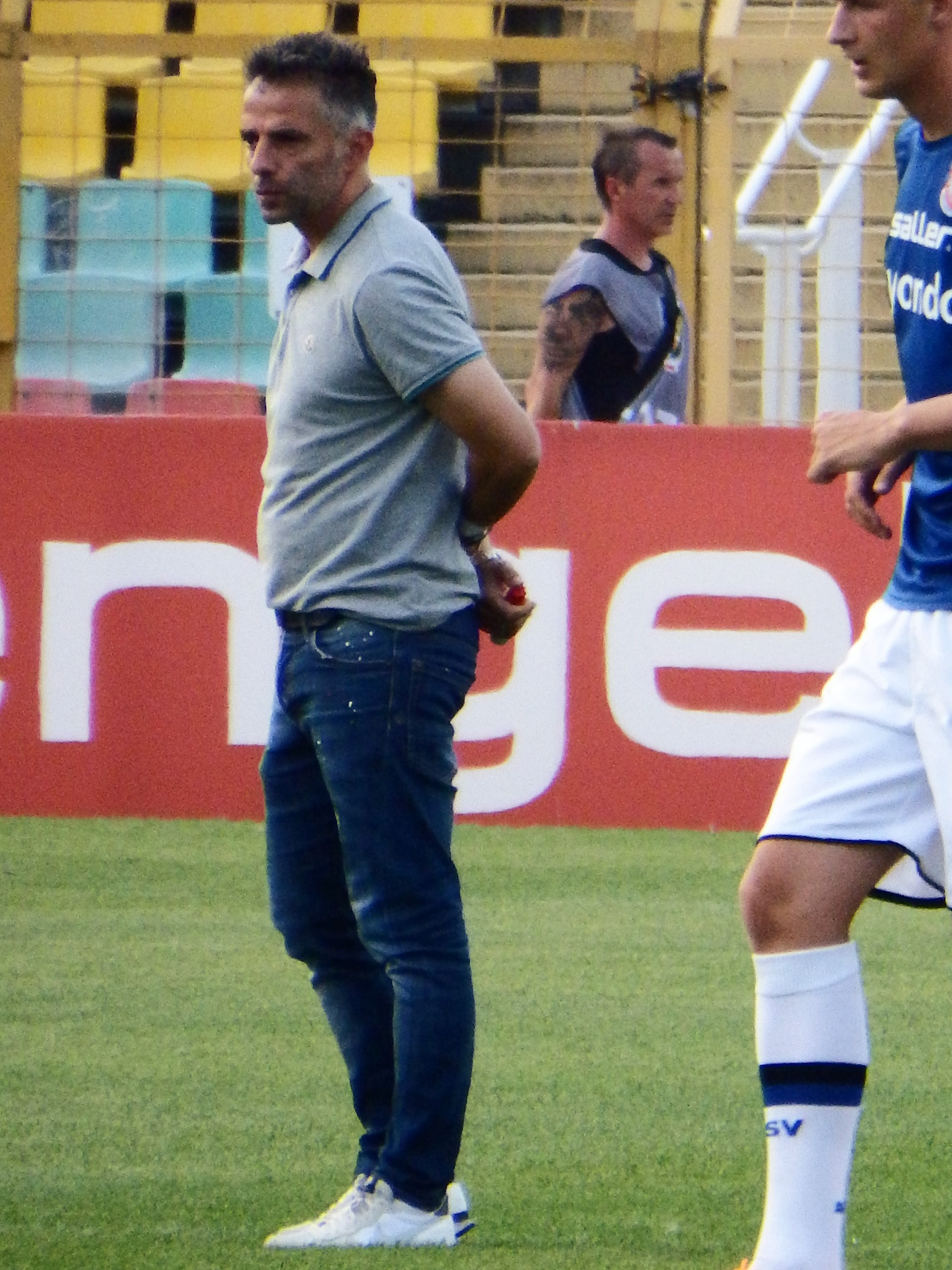 Oral, Tomas Trainer FSV Frankfurt